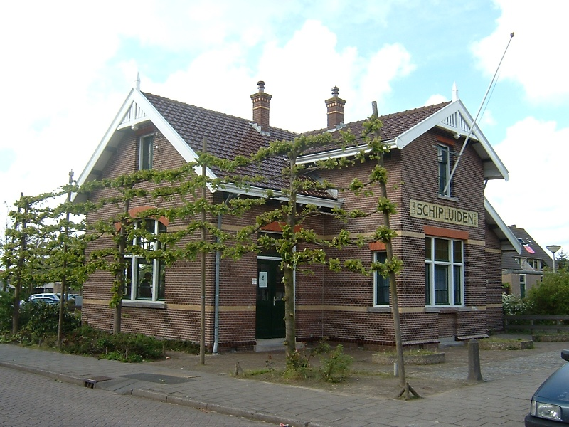 Netherlands: Schipluiden (gemeente Midden-Delfland). Tramstation. Former tramway station, now museum.